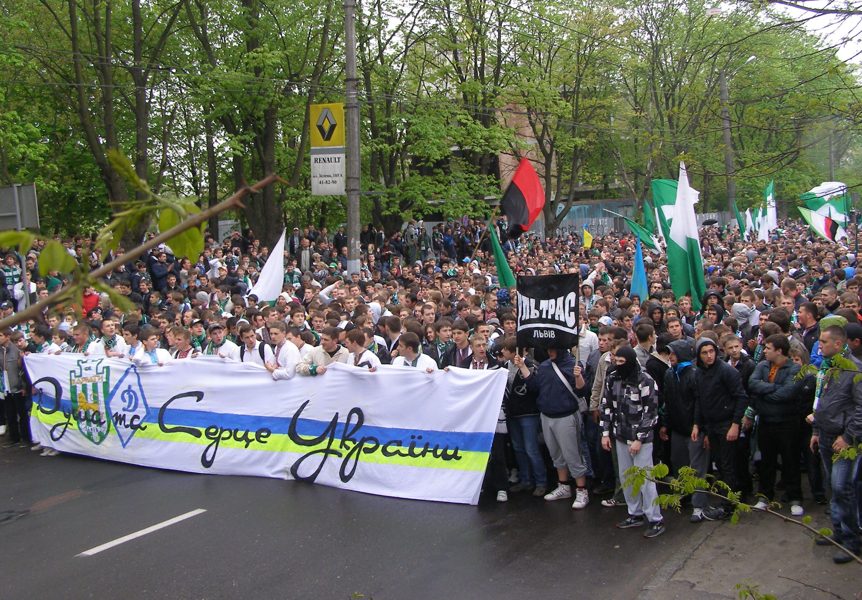 Banner von Karpaty Lwiw und Dynamo Kyjiw ultras "Die Seele und das Herz der Ukraine" im Anmarsch zu dem Ukrajina-Stadion in Lwiw gezeigt